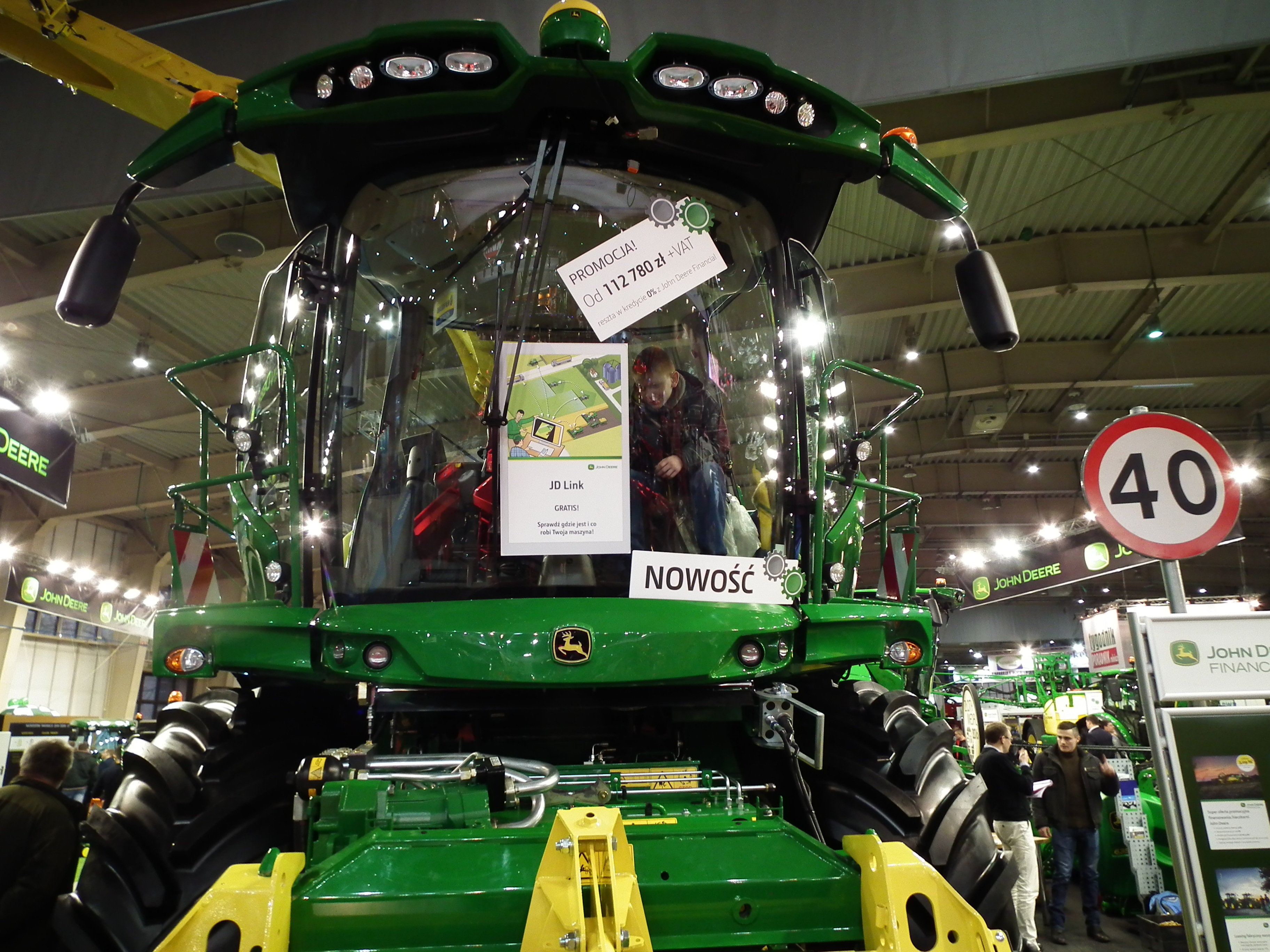 Targi Polagra Premiery w 2016r. Poznań.